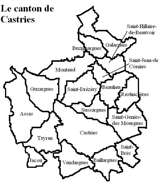 Le canton de Castries Image personnelle